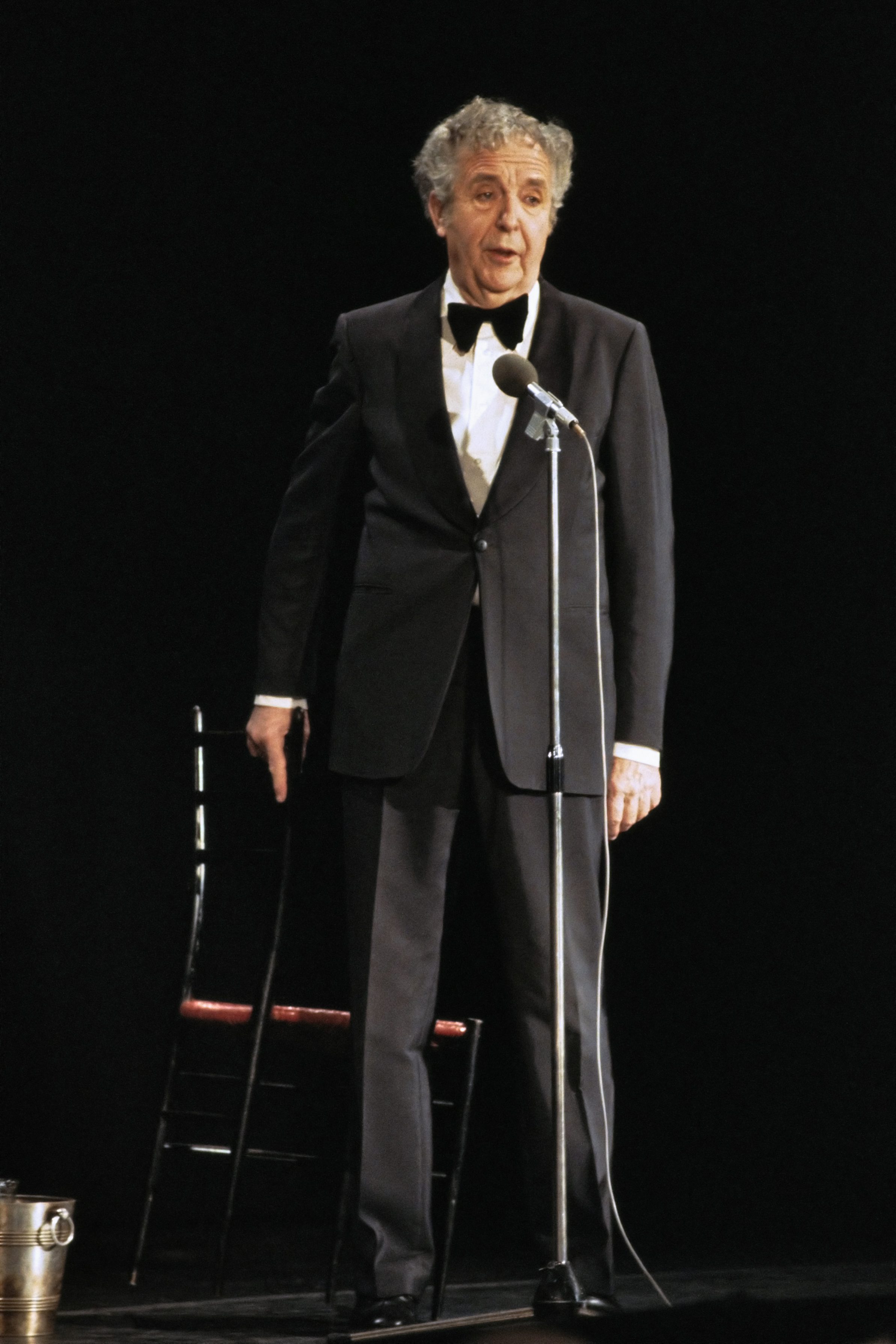 Wim Kan tijdens Oudejaarsconference 1979 december 1979